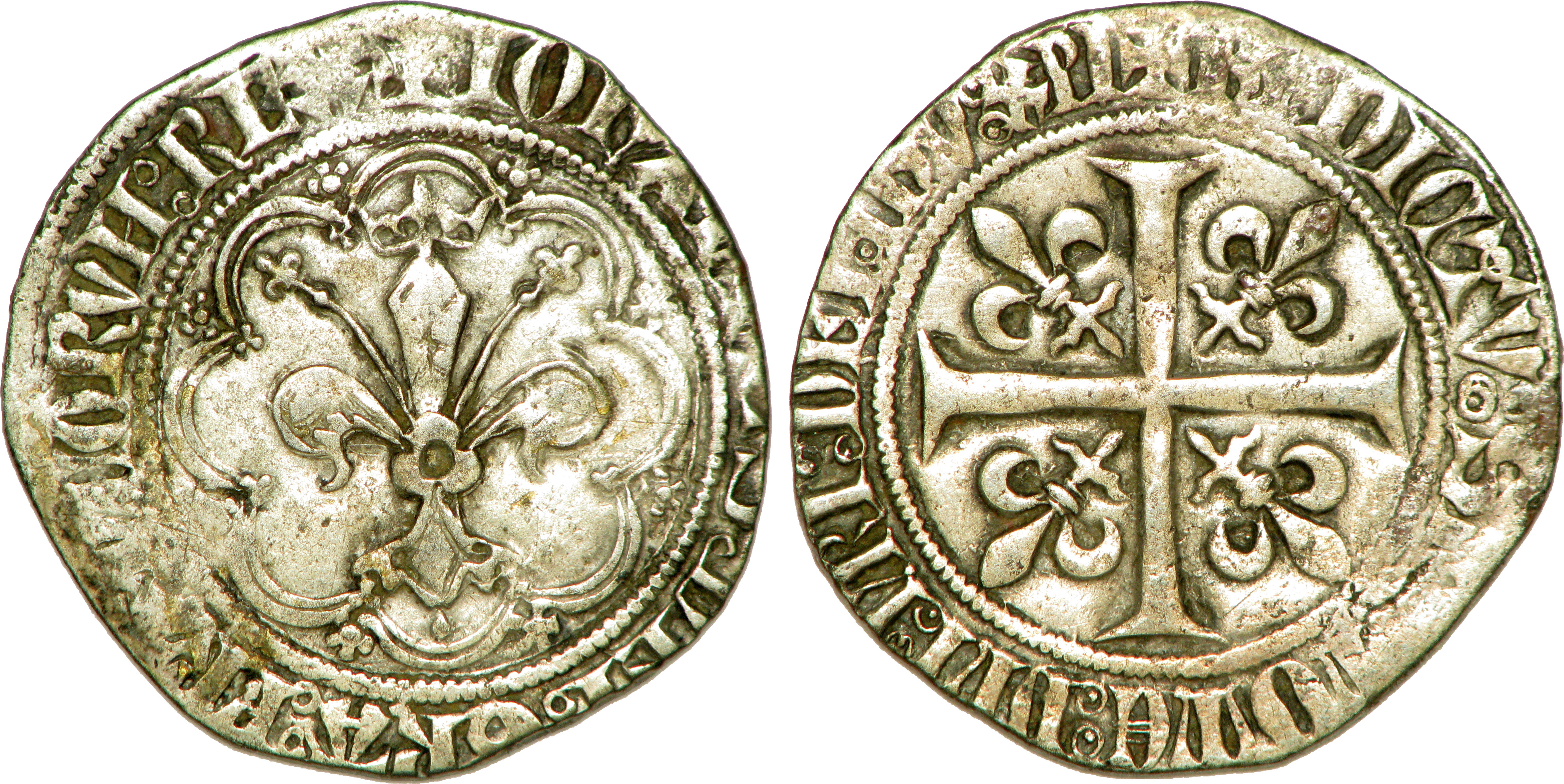 Métal : billon Diamètre : 27mm Axe des coins : 12h. Poids : 3,81g. Titulature avers : + IOhAnnES: DEI: GRA: FRAnCORVN: REX, (ponctuation par deux annelets pointés superposés). Description avers : Lis couronné avec trèfle en cœur, dans un polylobe tréflé accosté de roses. Traduction avers : (Jean, par la grâce de Dieu, roi des Francs). Titulature revers : + BnDICTV: SI[T:] nOmE: DnI: nRI: DEI: IhV: XPI, (ponctuation par deux annelets pointés superposés). Description revers : Croix cantonnée de quatre lis. Traduction revers : (Béni soit le nom de notre seigneur Jésus-Christ). Fabrication: 22 January 1358